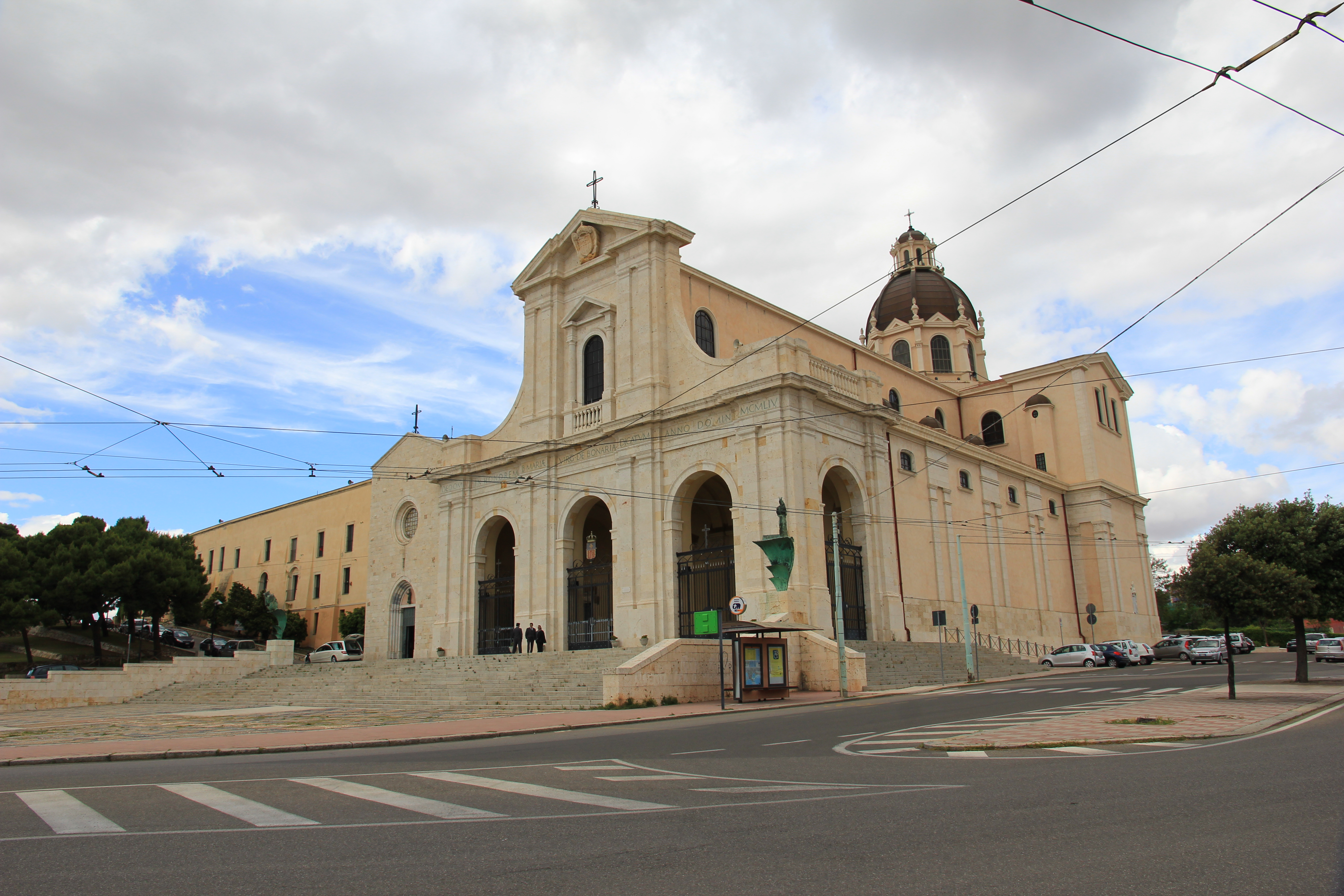 Cagliari - Santuario della Madonna di Bonaria